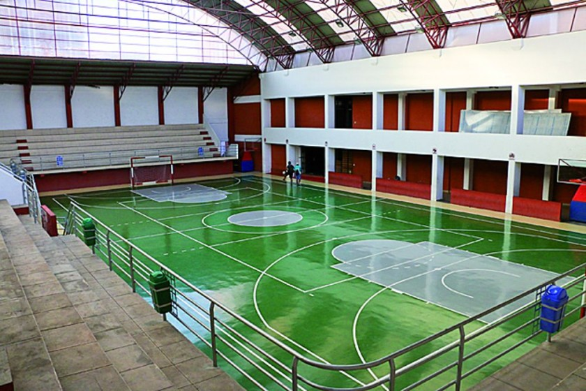 campo deportivo de universidad de sucre